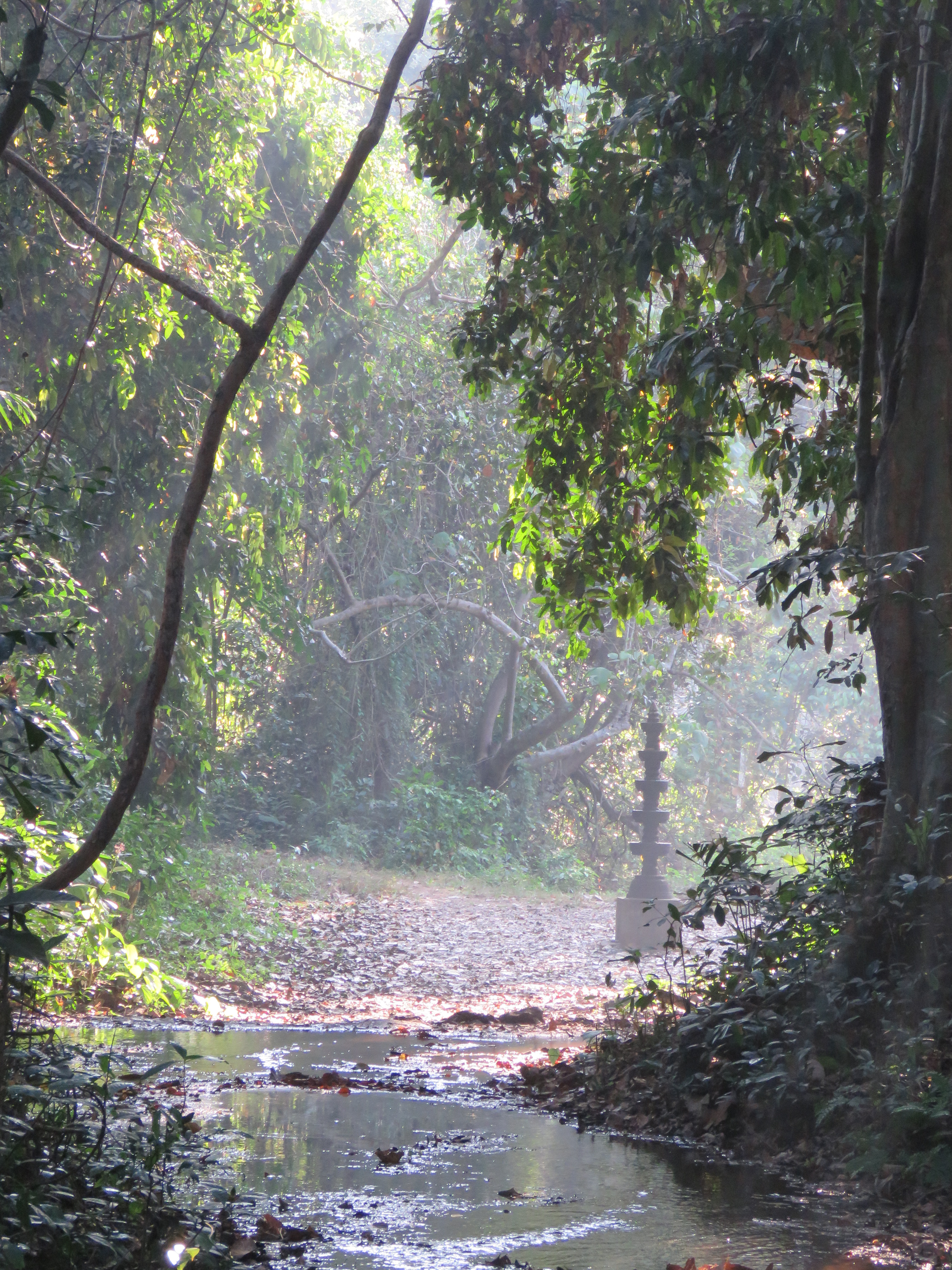 Photos by Vinayaraj